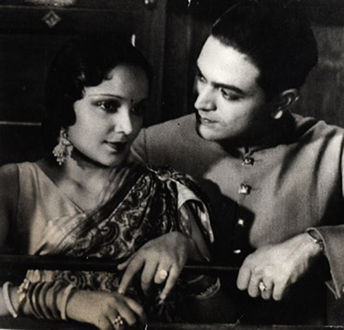 Devika Rani et Najmul Hasan à la fenêtre du wagon dans Jawani Ki Hawa (1935)